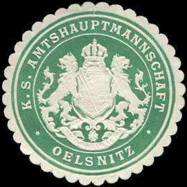 Sealing stamp Title: Königlich Sächsische Amtshauptmannschaft - Oelsnitz Description: grün, weiß, geprägt Place: Oelsnitz size: 4 cm